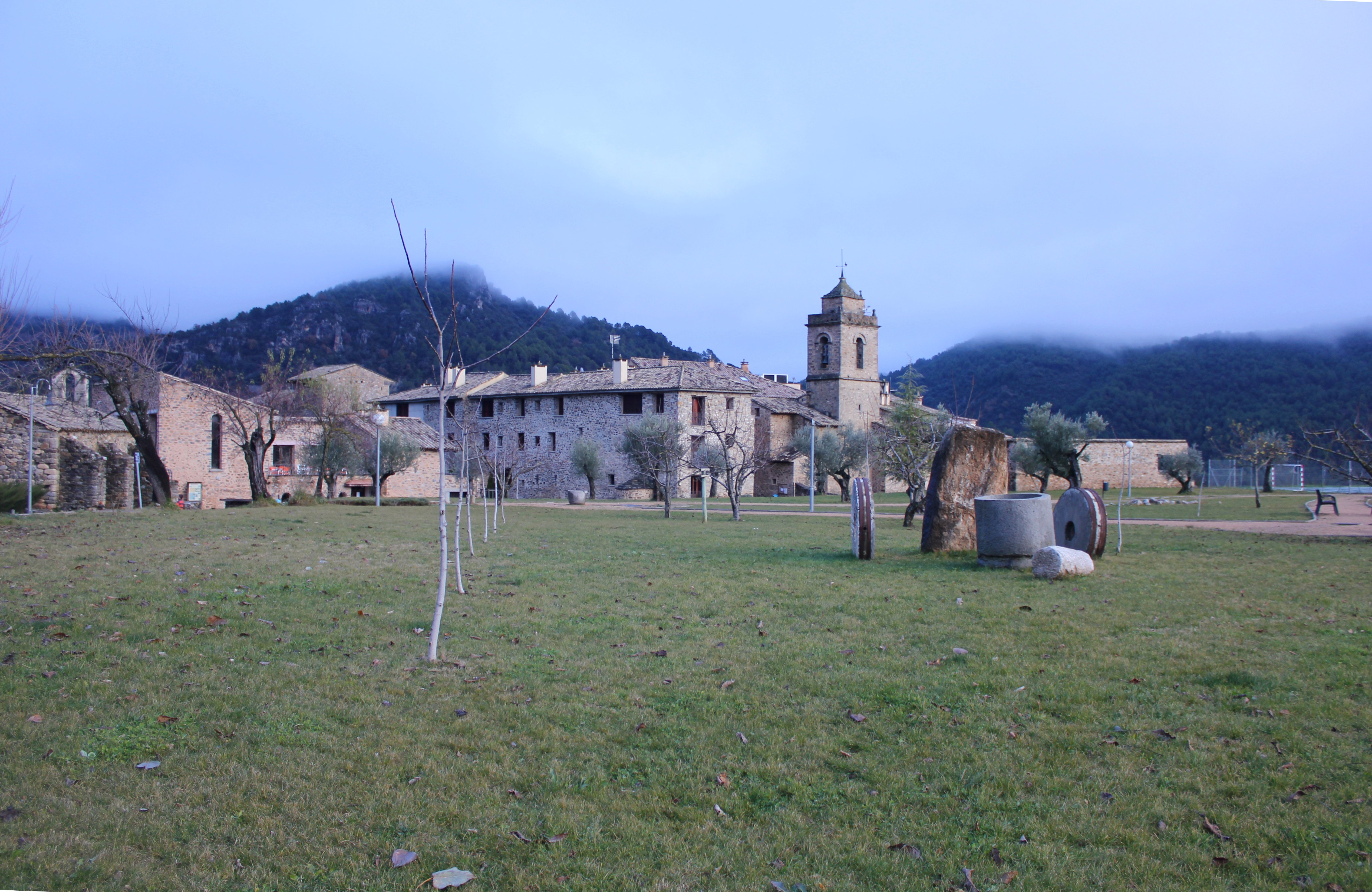 Aragonés: Ligüerre